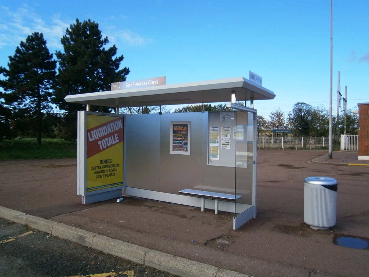 Plaisir (78) : L'arrêt de bus de la gare de Plaisir - Les Clayes.